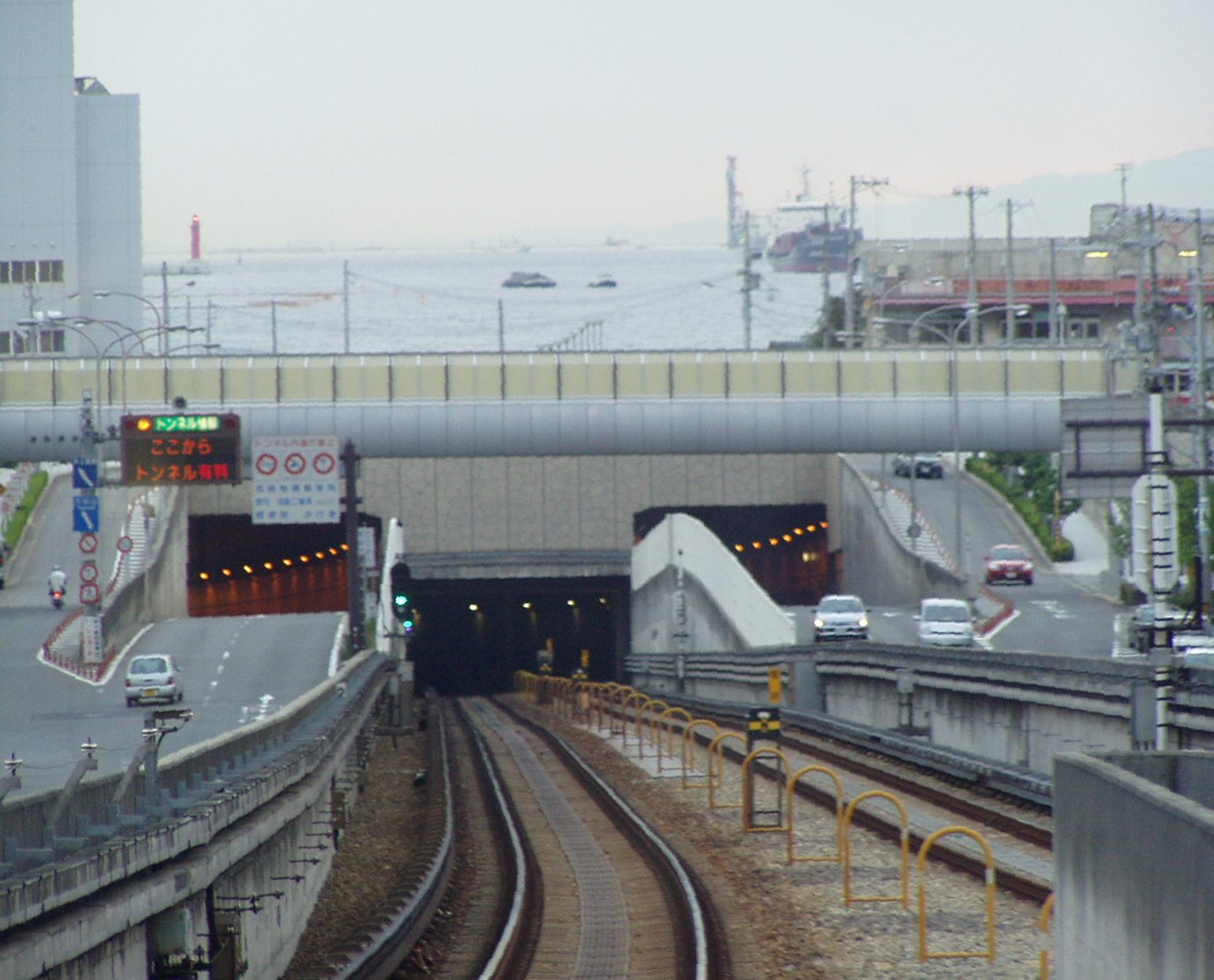 Osaka. Metro Chuo Line diving under the Osaka Harbour.